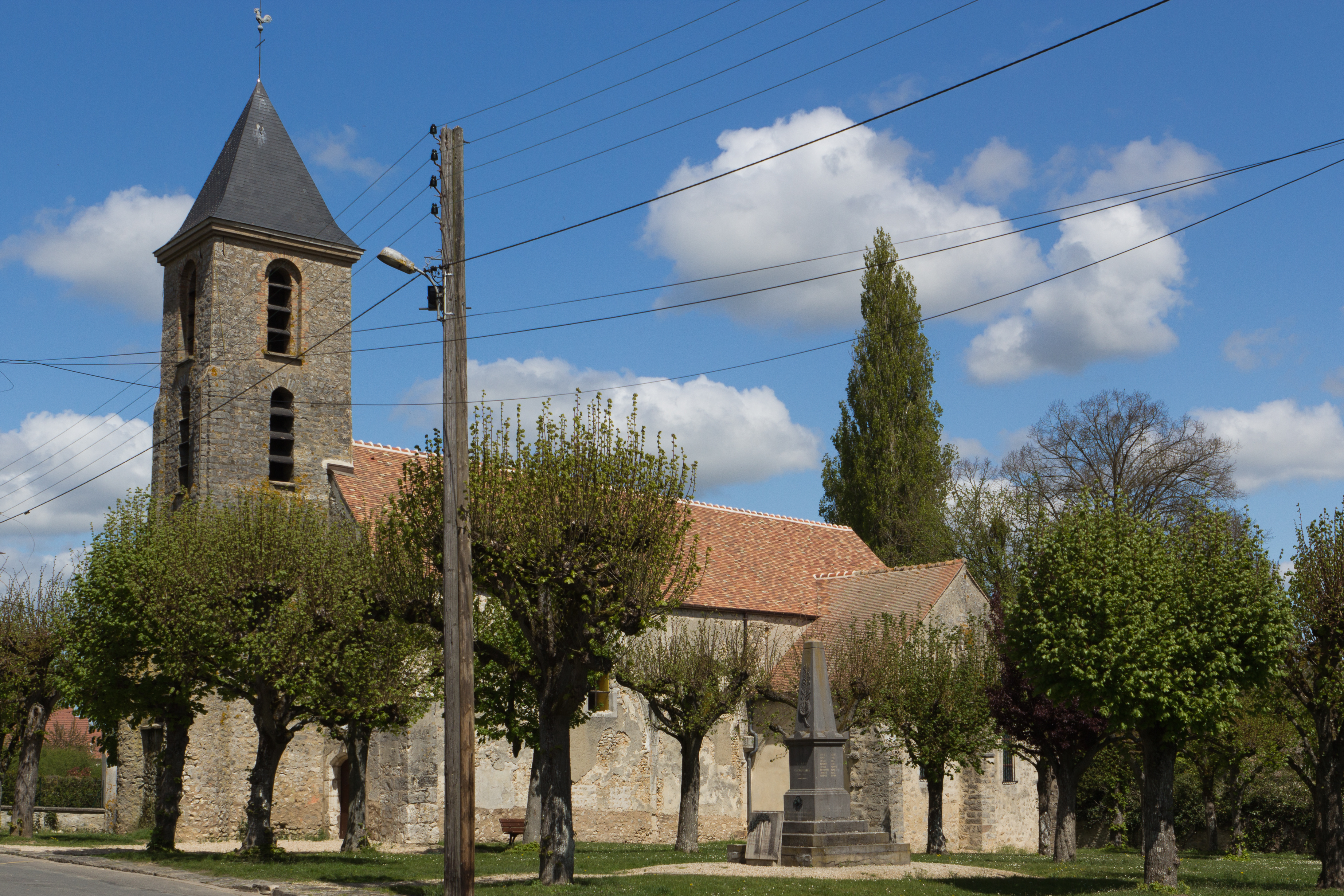 Église de D'Huison-Longueville, D'Huison-Longueville, département de l'Essonne, France.